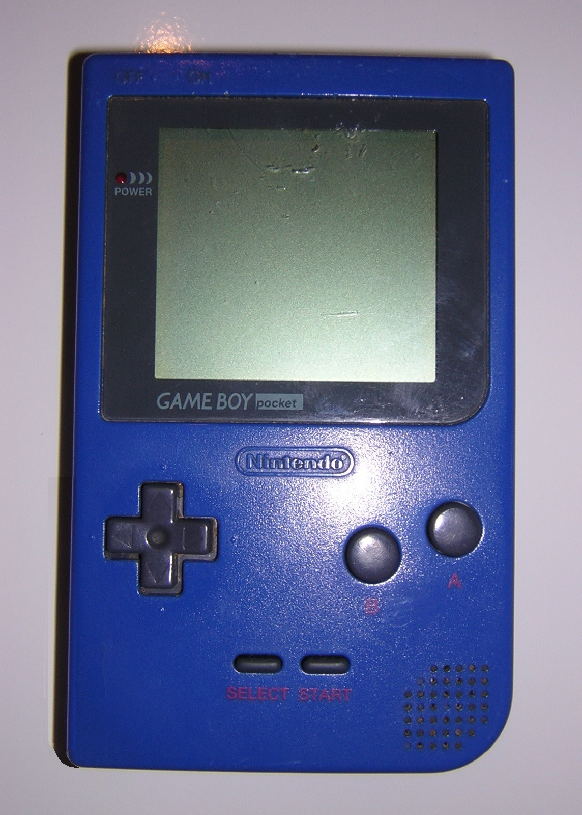 Imagen de mi consola portatil